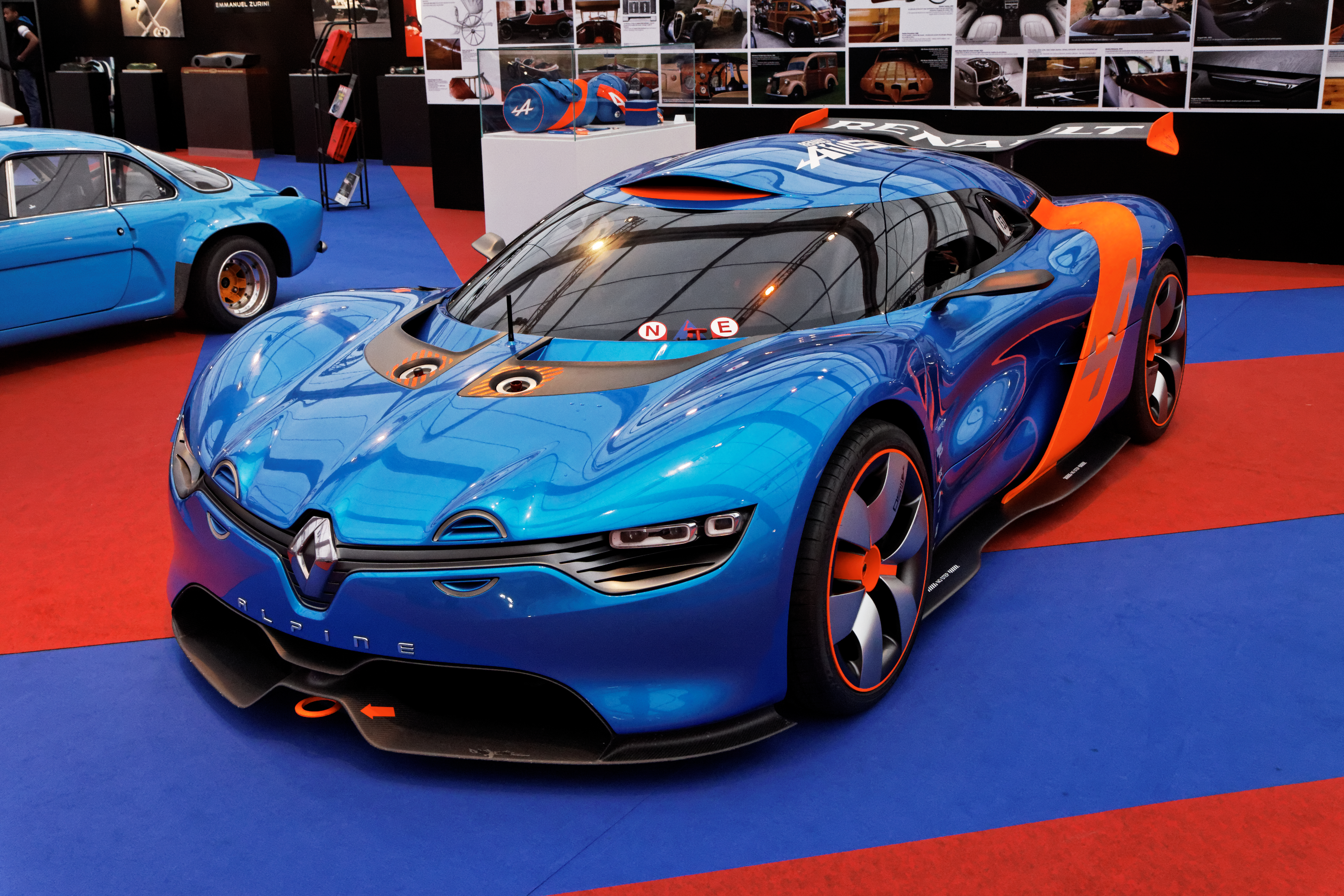 Une Renault Alpine A110 50 Concept exposée lors du festival automobile international 2013.